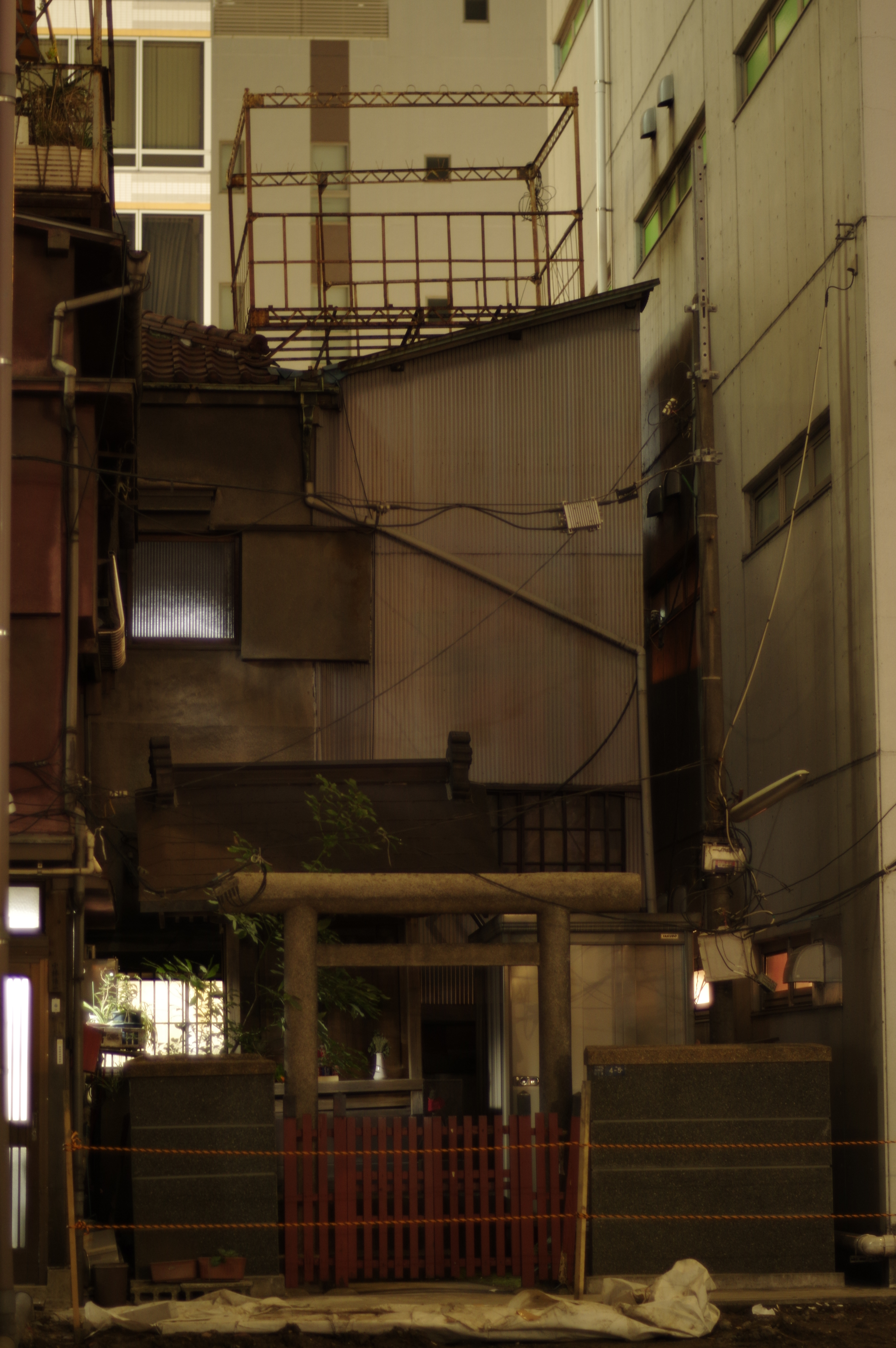 "花房稲荷神社、露出す 唐澤商店とリッツコンピュートが取り壊されるまで、全然知らなかった" References 花房神社 －民家の中に厳かに佇む江戸時代から続く秋葉原の守り神. (2007-04-05). 秋葉原のお稲荷さん - 「花房神社」 （千代田区外神田鎮座）. 神のやしろを想う . "「花房神社」 （千代田区外神田鎮座） / 祭神：宇之迦魂命 / 創建年代は不詳。江戸時代より当地に鎮座とされる。" 町名由来板：神田田代町（かんだたしろちょう）. 千代田区ホームページ. Chiyoda word, Tokyo. "• 設置年月日：平成16年1月8日 / • 所在地：外神田四丁目3番 / 町名由来板 / この界隈は、外神田四丁目になる前は、神田田代町と呼ばれていました。 ... / 町内の路地裏には「花房稲荷神社（はなぶさいなりじんじゃ）」があります。現在の社は戦後、地元住民が再建したものですが、神社そのものは江戸時代からこの地にあったとされ、古くから地域のシンボルとして人々に親しまれています。"